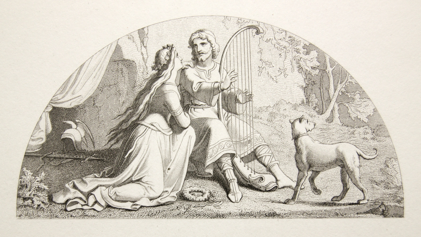 Schloss Schwerin, Kupferstich nach Wilhelm Peters' Wandgemälde Isolde vereint sich wieder mit Tristan im Sagenzimmer